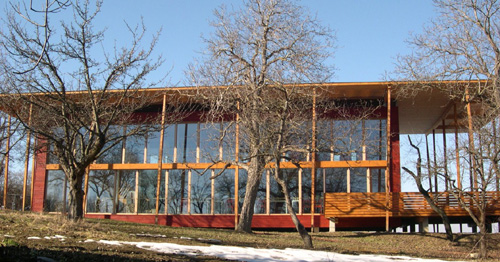 S-House, ein ökologisches strohballengedämmtes Passivhaus in nichttragender Bauweise mit hinterlüfteter Holzfassade. Standort: Böheimkirchen, Österreich Baujahr: 2005 Ansicht der Südseite im Winter.